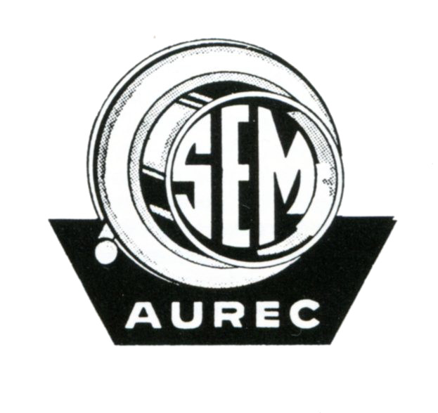 Logo de l'entreprise de fabrication d'appareils photo SEM à Aurec (Haute-Loire)